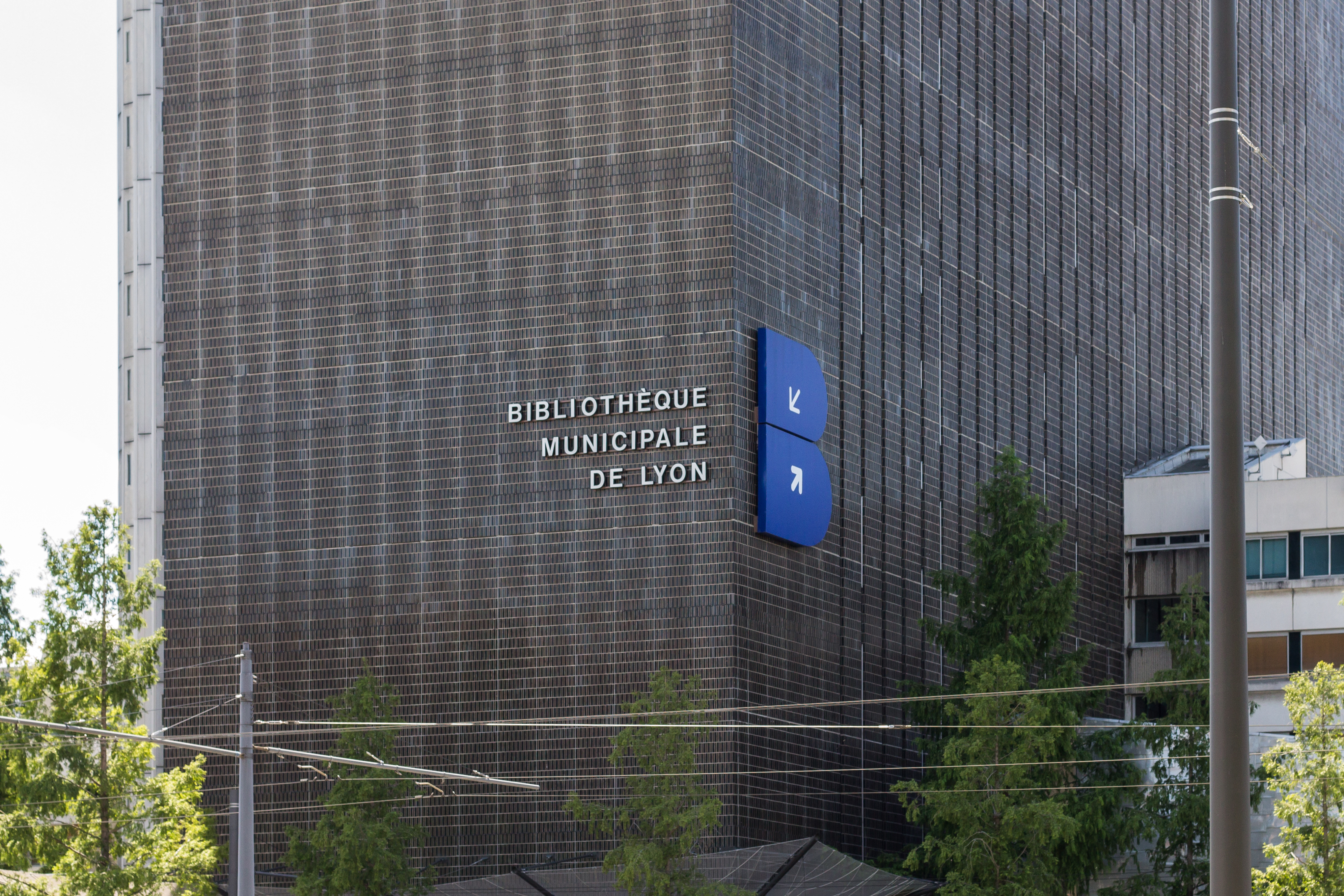 Façade du silo de la bibliothèque municipale de Lyon dans le quartier de la Part Dieu